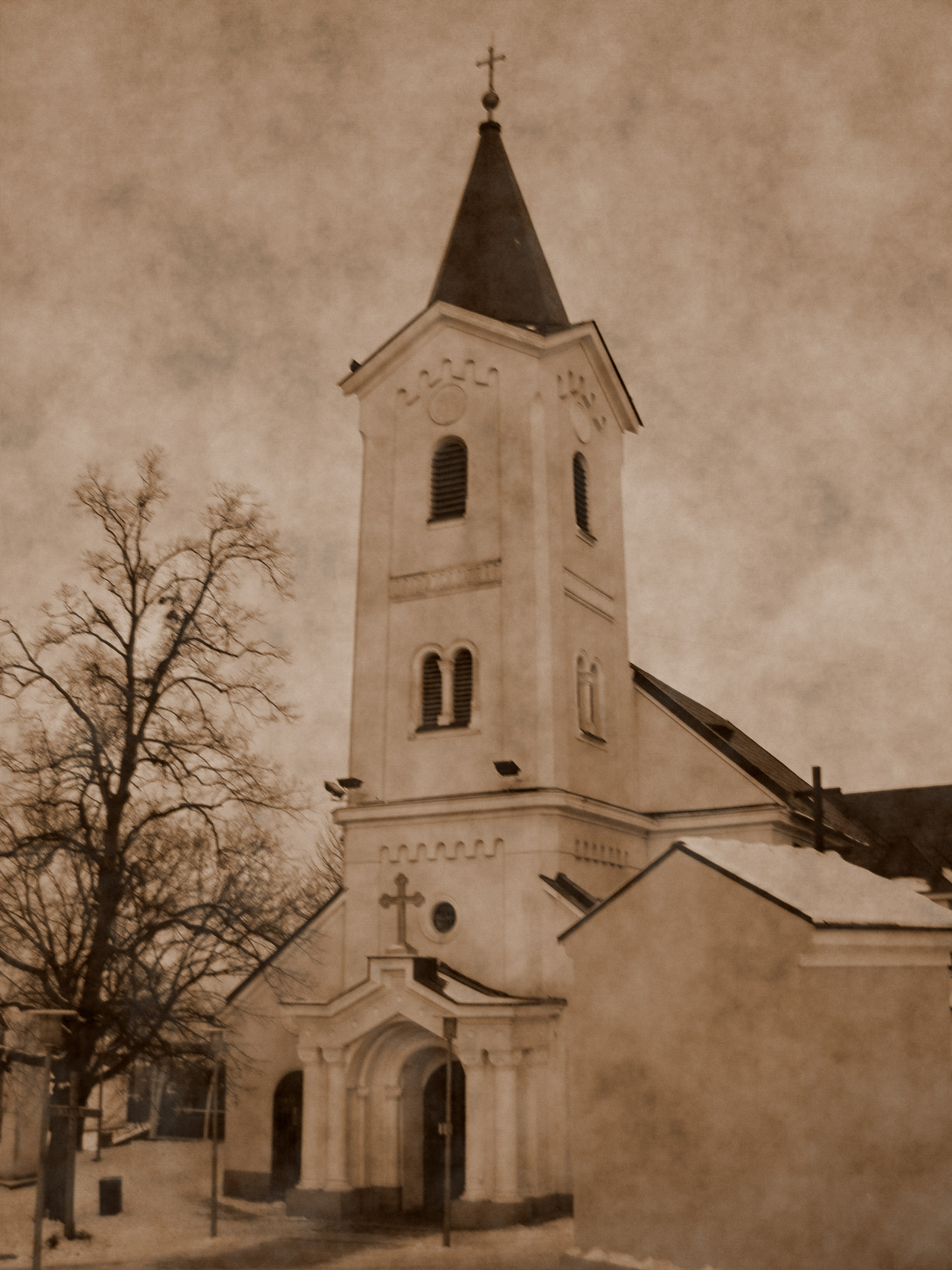 Kostol